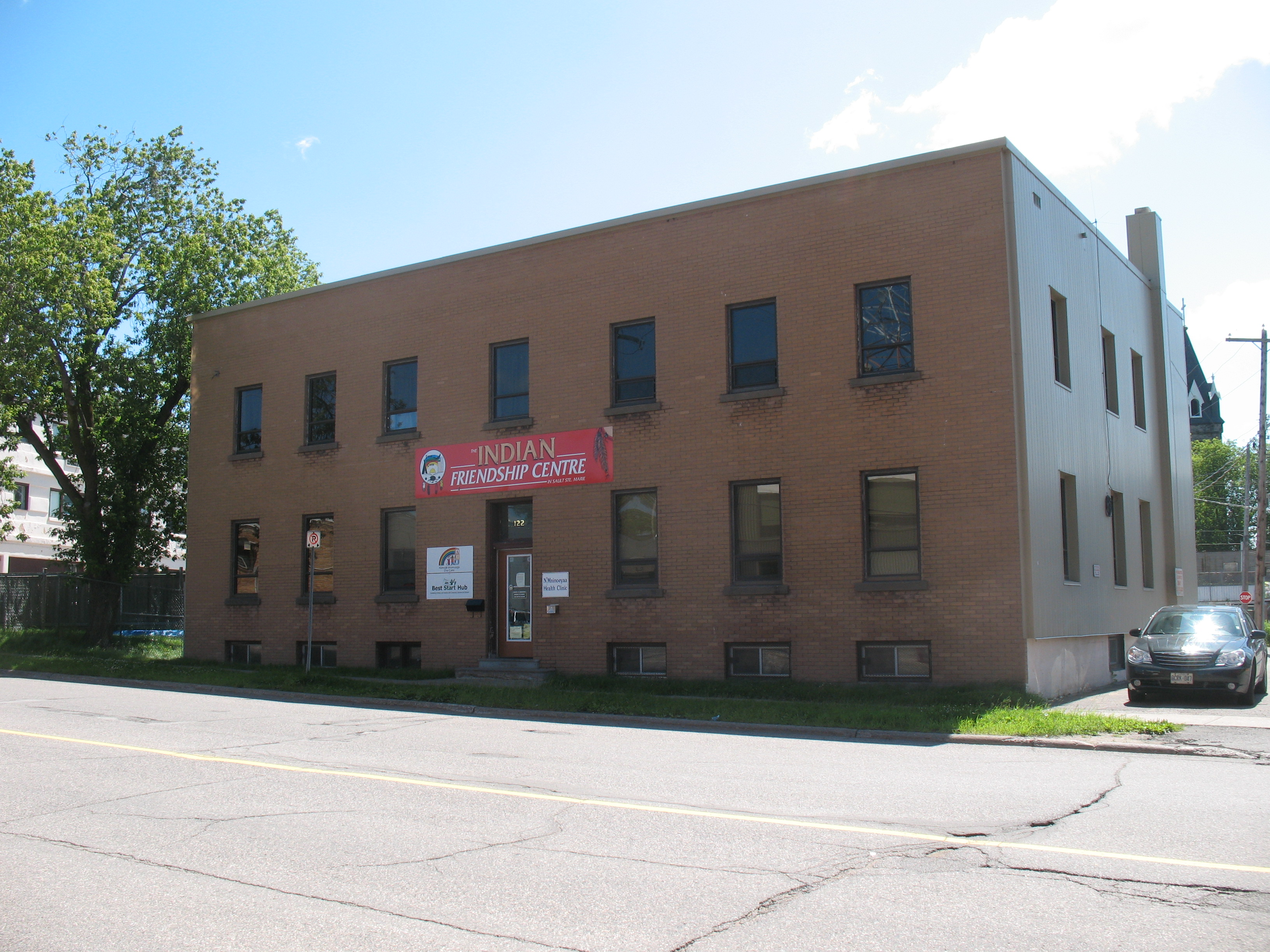 Sault Ste. Marie (Ontario), Indian Friendship Centre